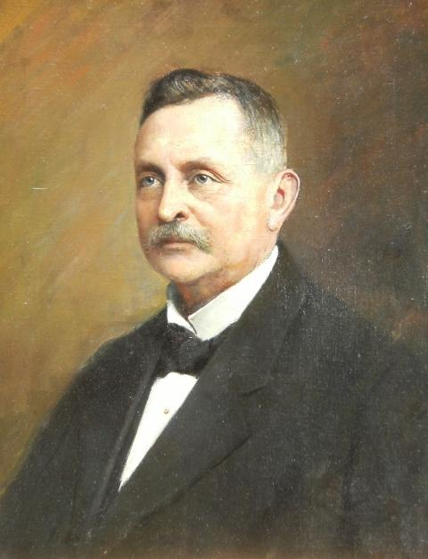 Carl August Beug (1816-1906), deutscher Unternehmer